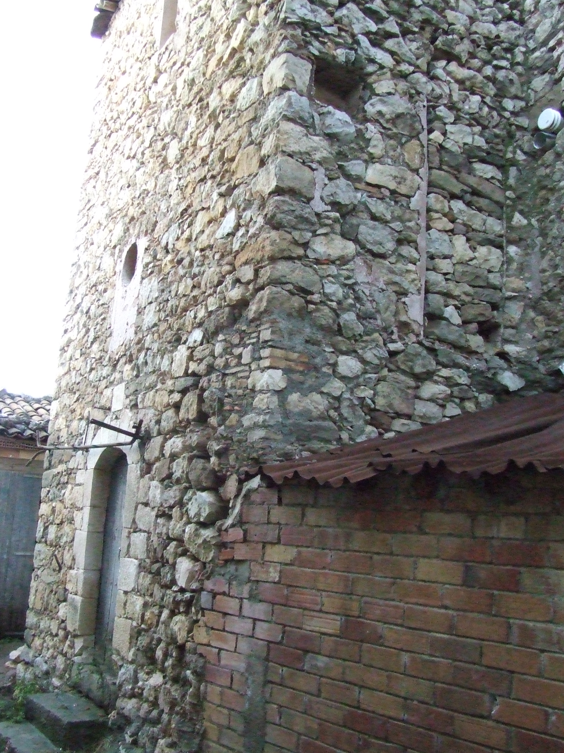 La capella de Sant Antoni de Pàdua (Els Masos de Llimiana, Llimiana, Pallars Jussà)